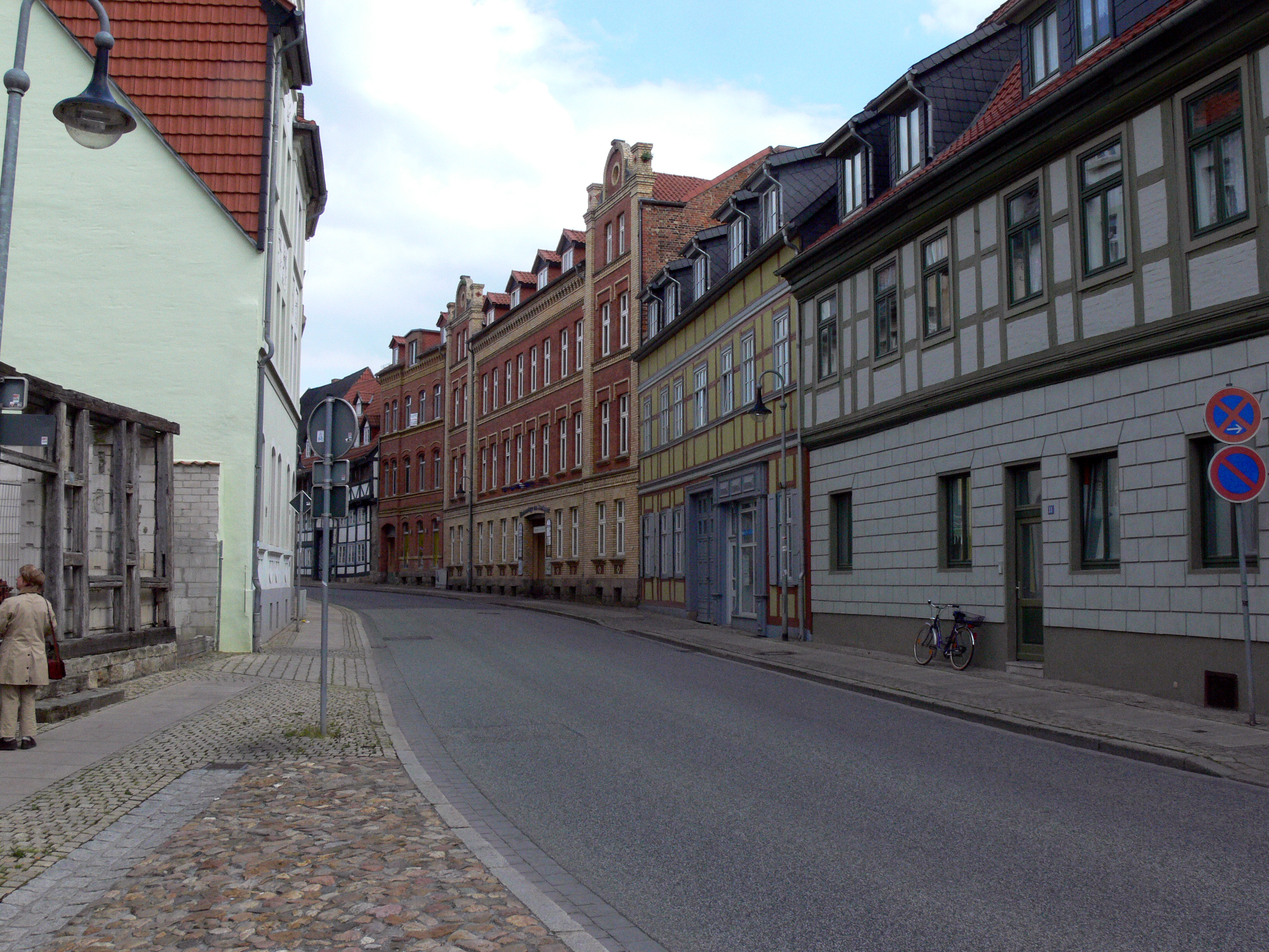 Westendorf in Halberstadt.